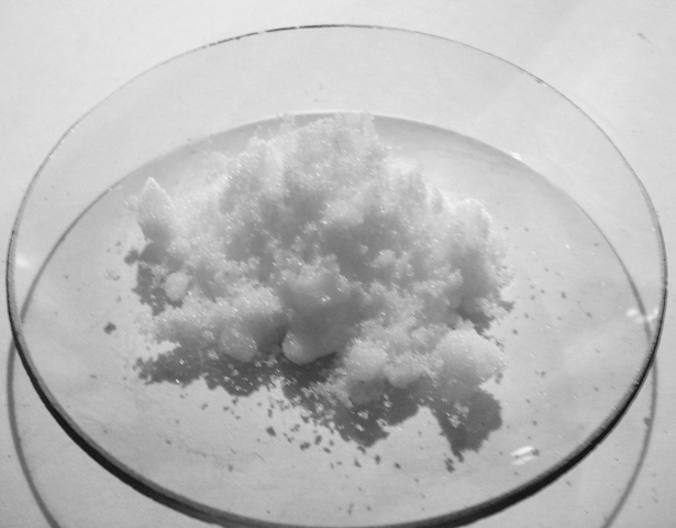 NaBr